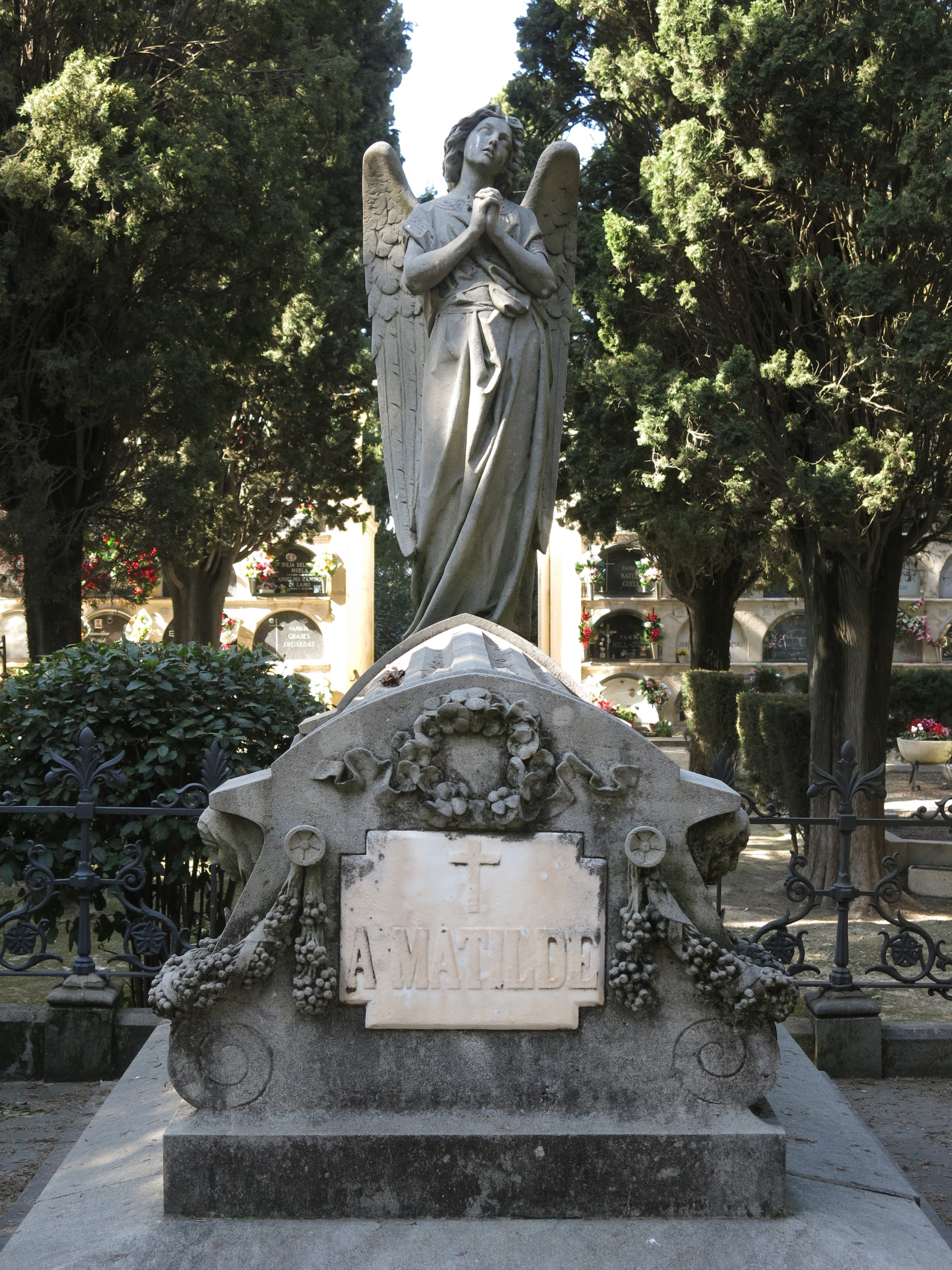 Cementiri municipal de Vilafranca del Penedès